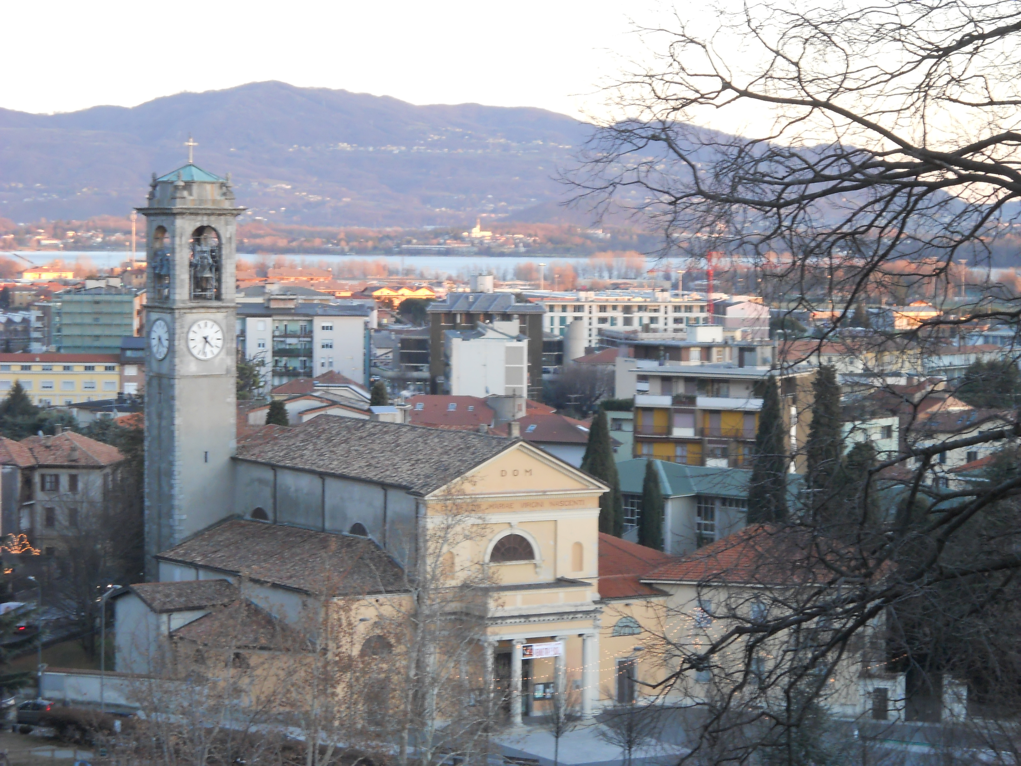 Chiesa di Santa Maria Nascente, Erba, Como, Italia